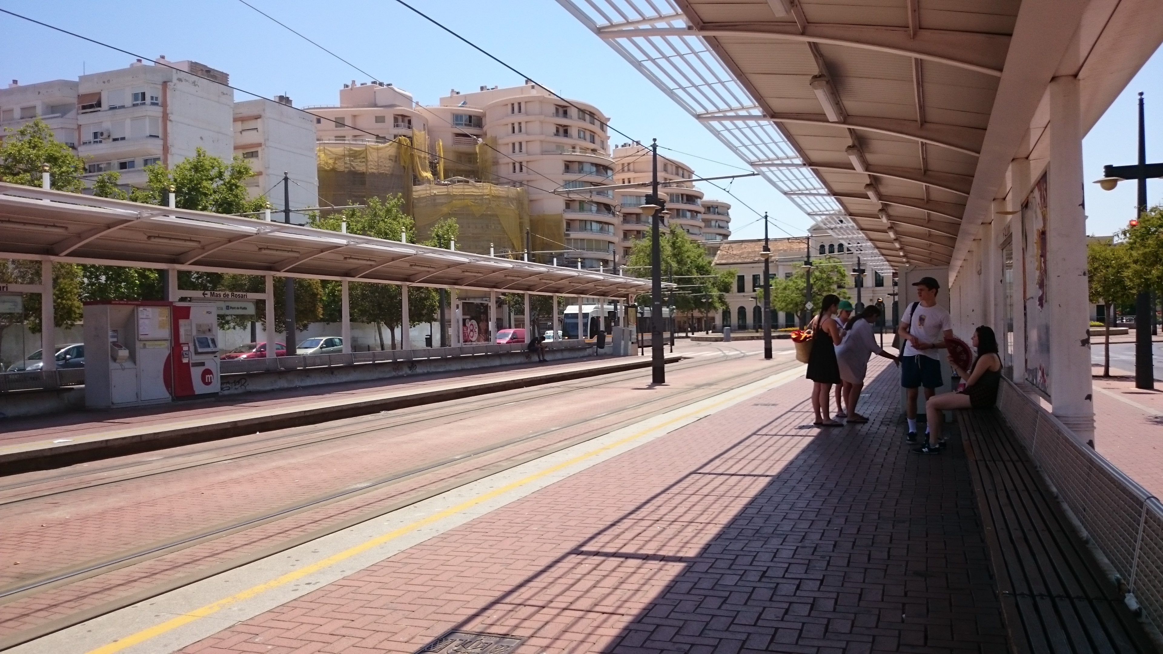 Tramstop Pont de Fusta